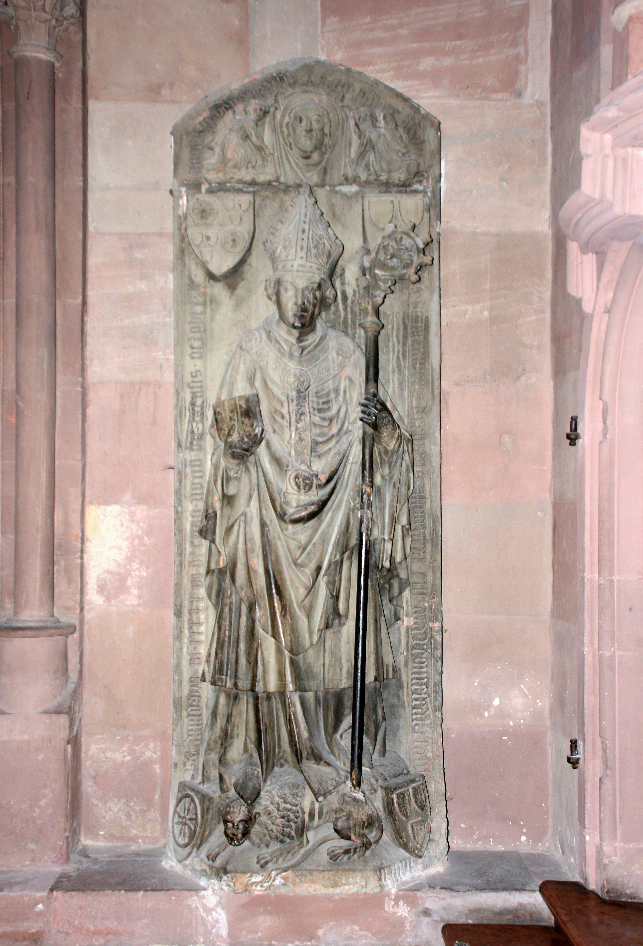 Epitaph des Mainzer Erzbischofs Konrad II. von Weinsberg im südlichen Querhaus des Mainzer Doms